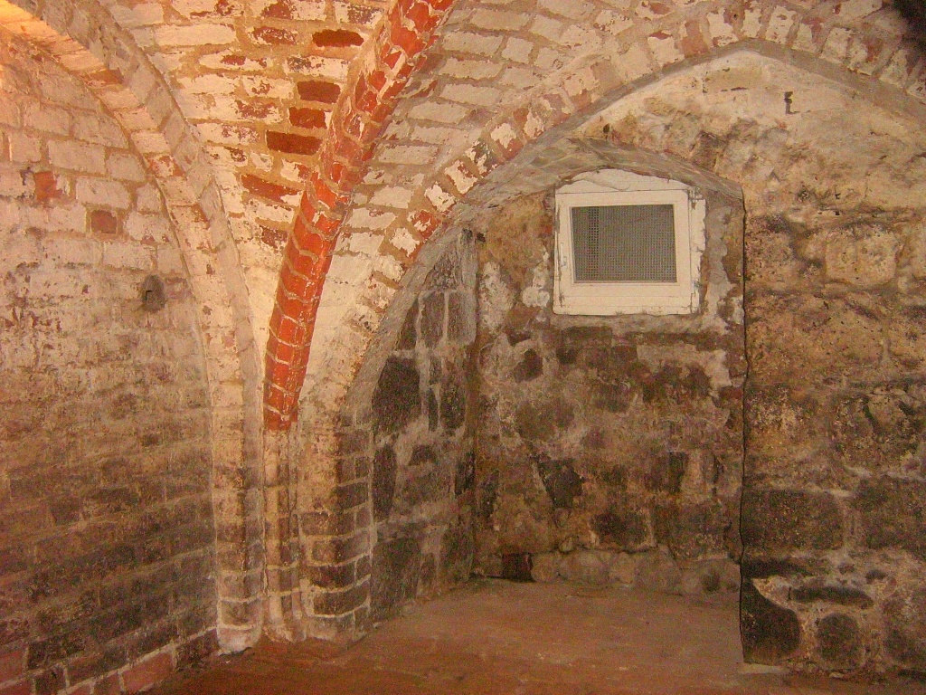 Das Kloster Broda war ein Stift des Prämonstratenserordens. Es wurde 1170 gestiftet, verarmte jedoch ziemlich schnell und wurde 1551 säkularisiert. Broda ist ein ehemaliges Dorf, welches heute zur Stadt Neubrandenburg in Mecklenburg gehört. Das Foto zeigt ein mittelalterliches Gewölbe eines Kellers des ehemaligen Klostertraktes, welches sich heute unter dem Gutshaus befindet.